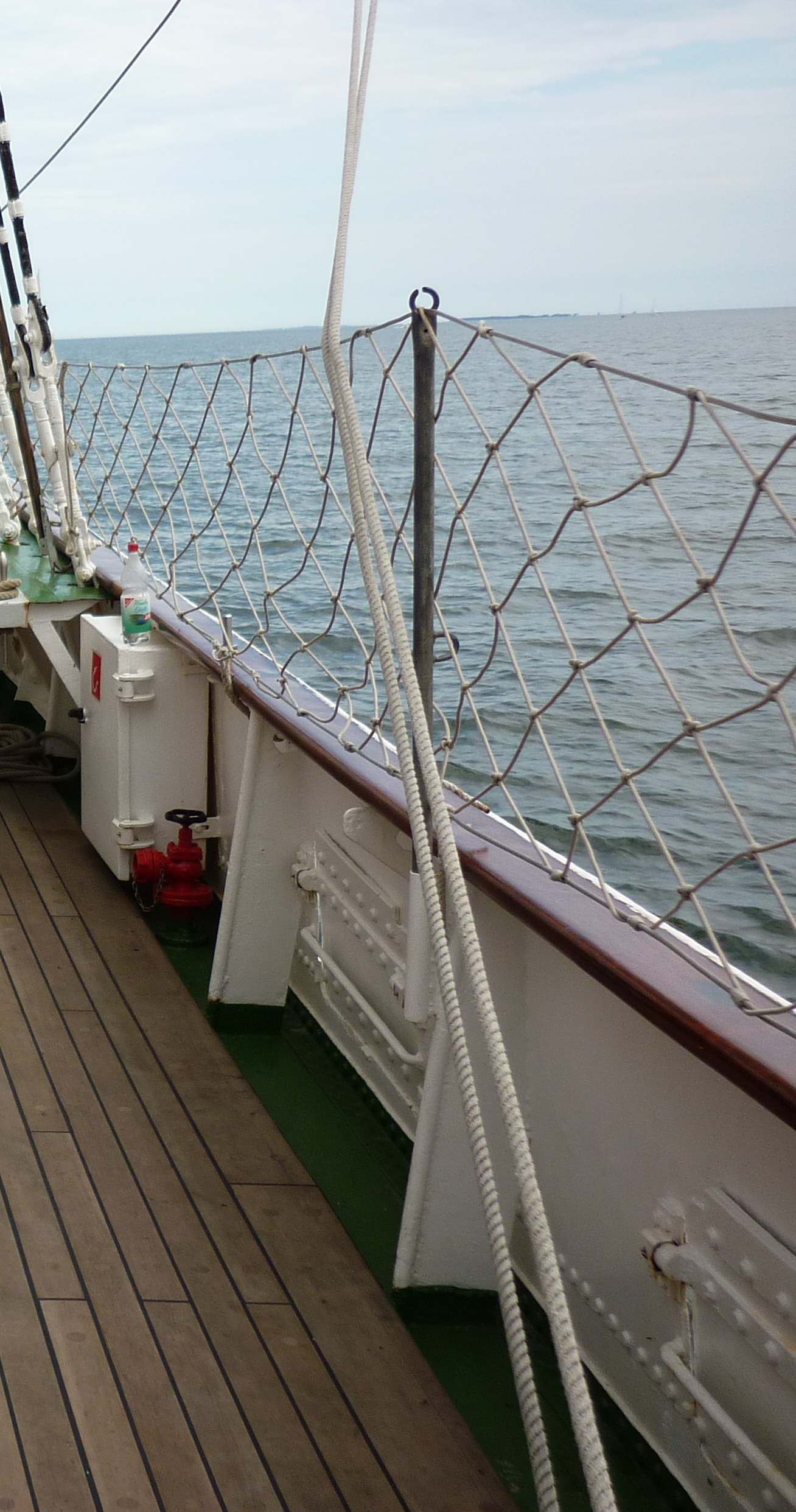 Schanzkleid (feste Reling) und darüber gespannter Leichenfänger (Sicherungsnetz) der Greif